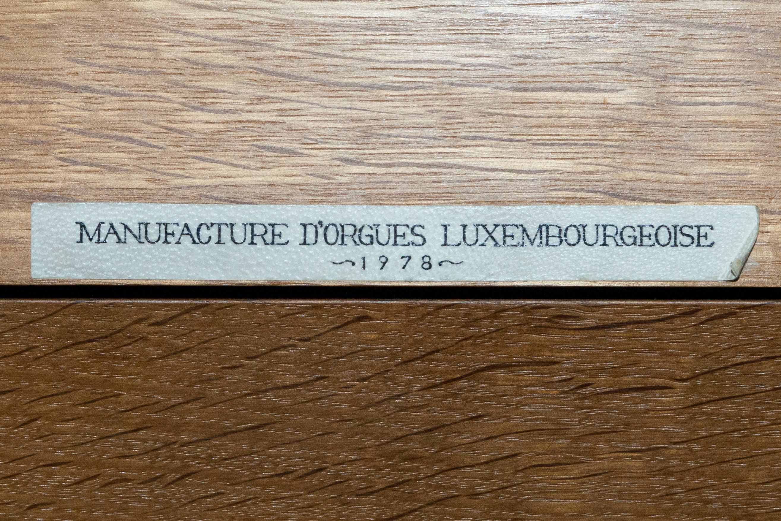 D'Uergel vun 1978 um Duxall vun der Bricher Kierch.